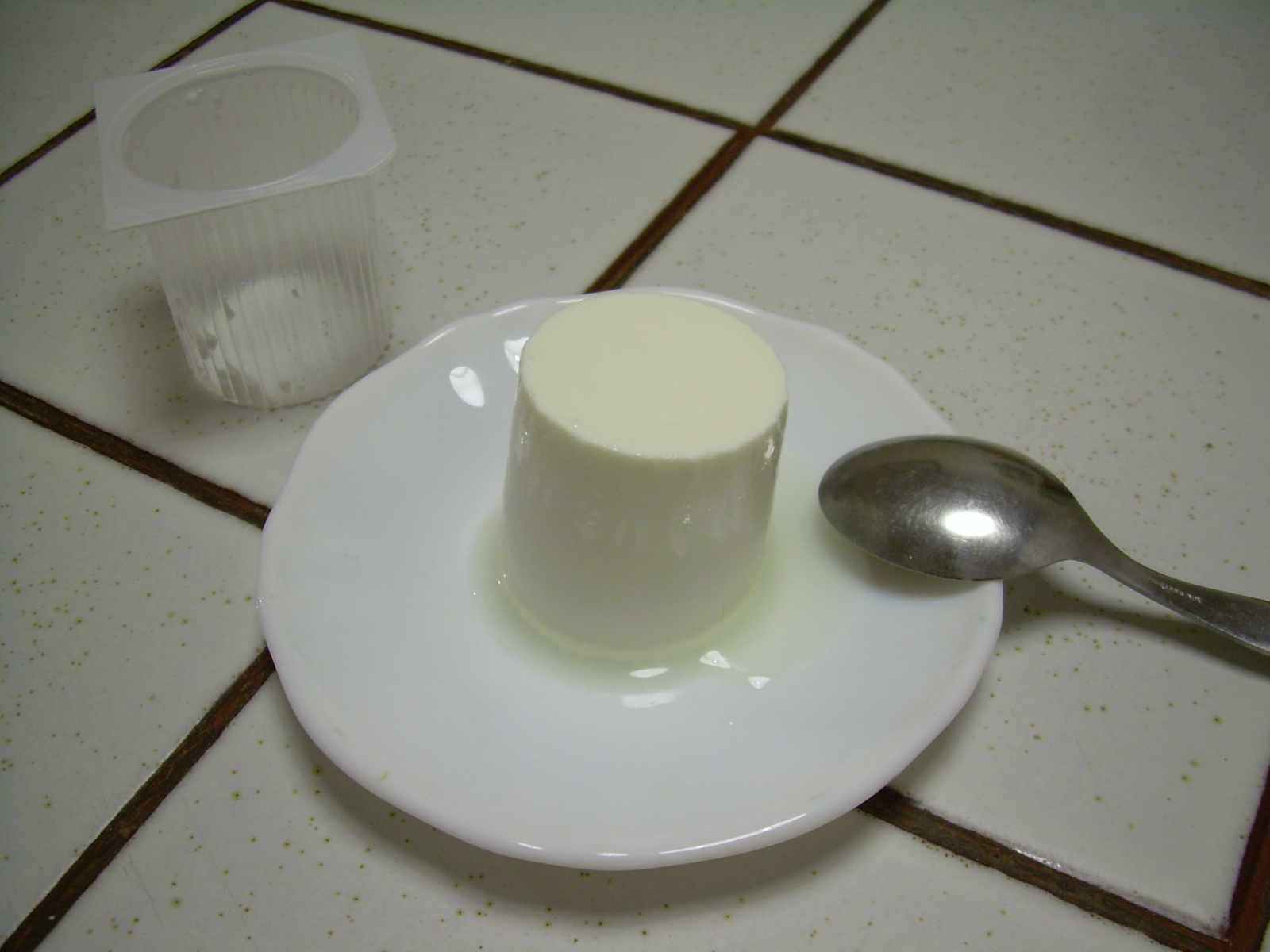 Un petit-suisse démoulé dans un assiette.